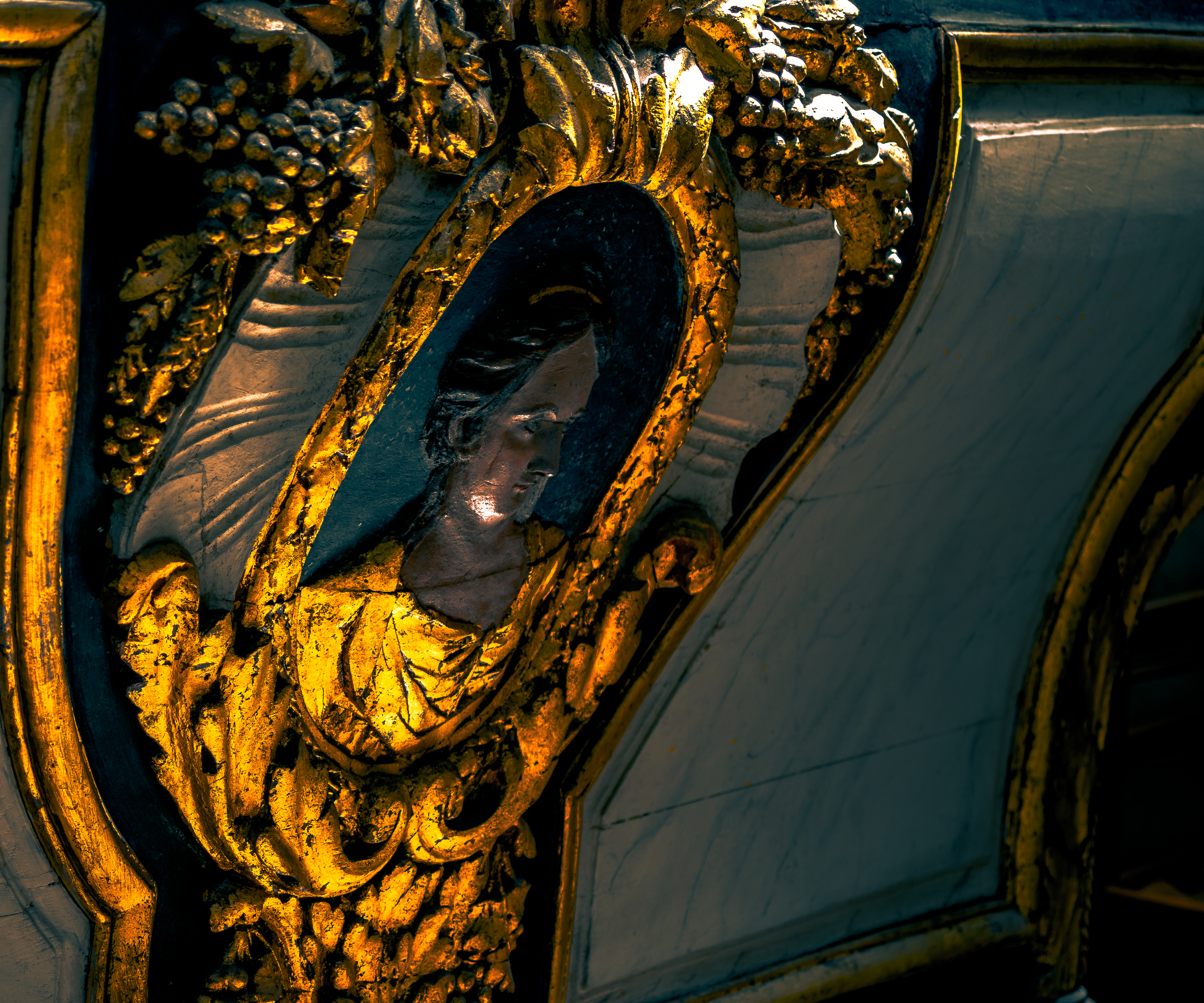 Médaillon de l'autel.